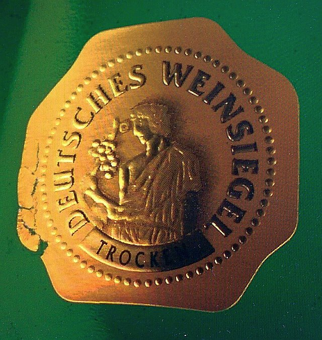 Weinflasche aus Grünglas mit dem "Deutschen Weinsiegel" in gelb für trockenen Wein.